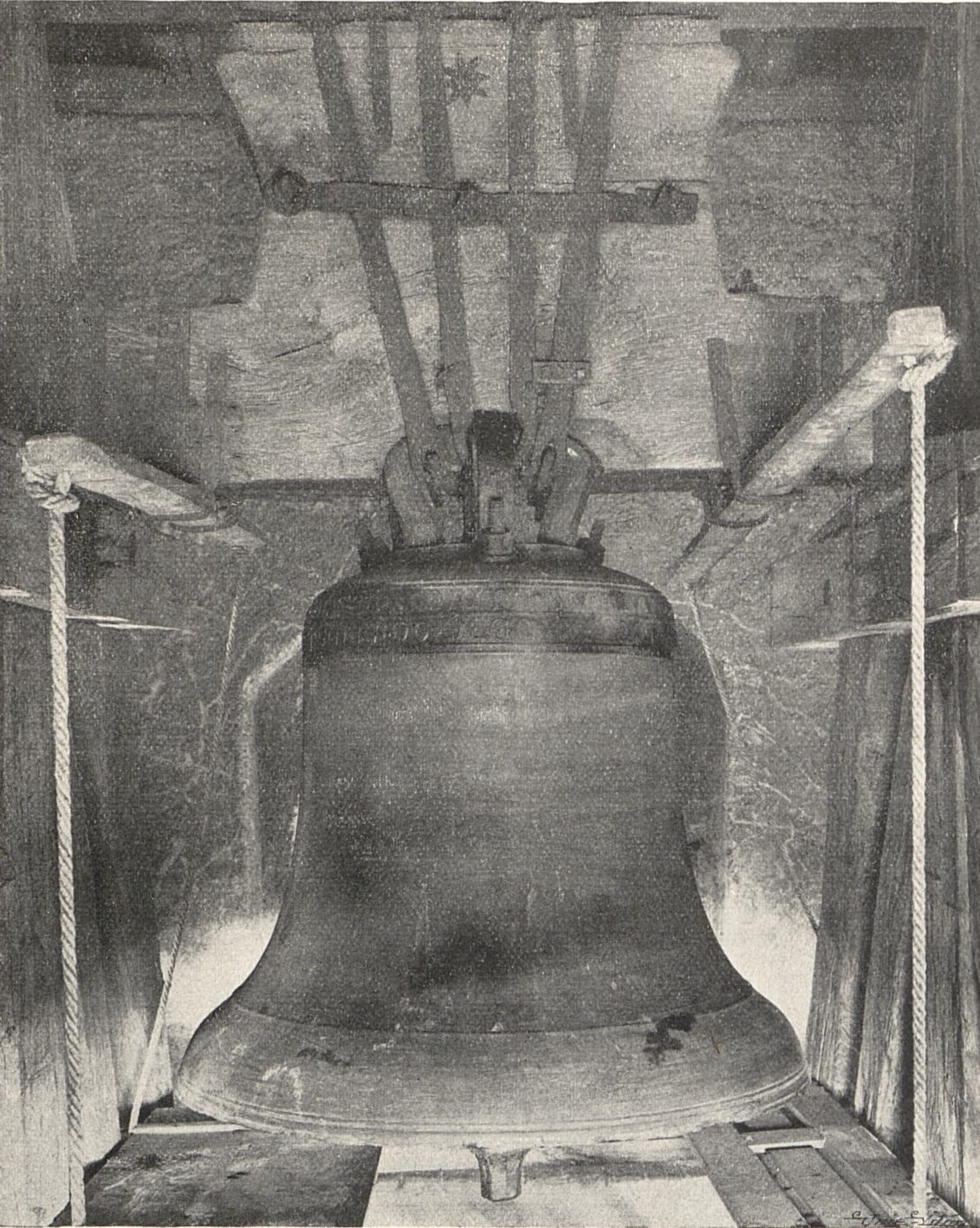 Zvon v Dolní zvonici v Benešově. Původní popisek: „Obr. 52. Benešov. Zvon z roku 1322.“